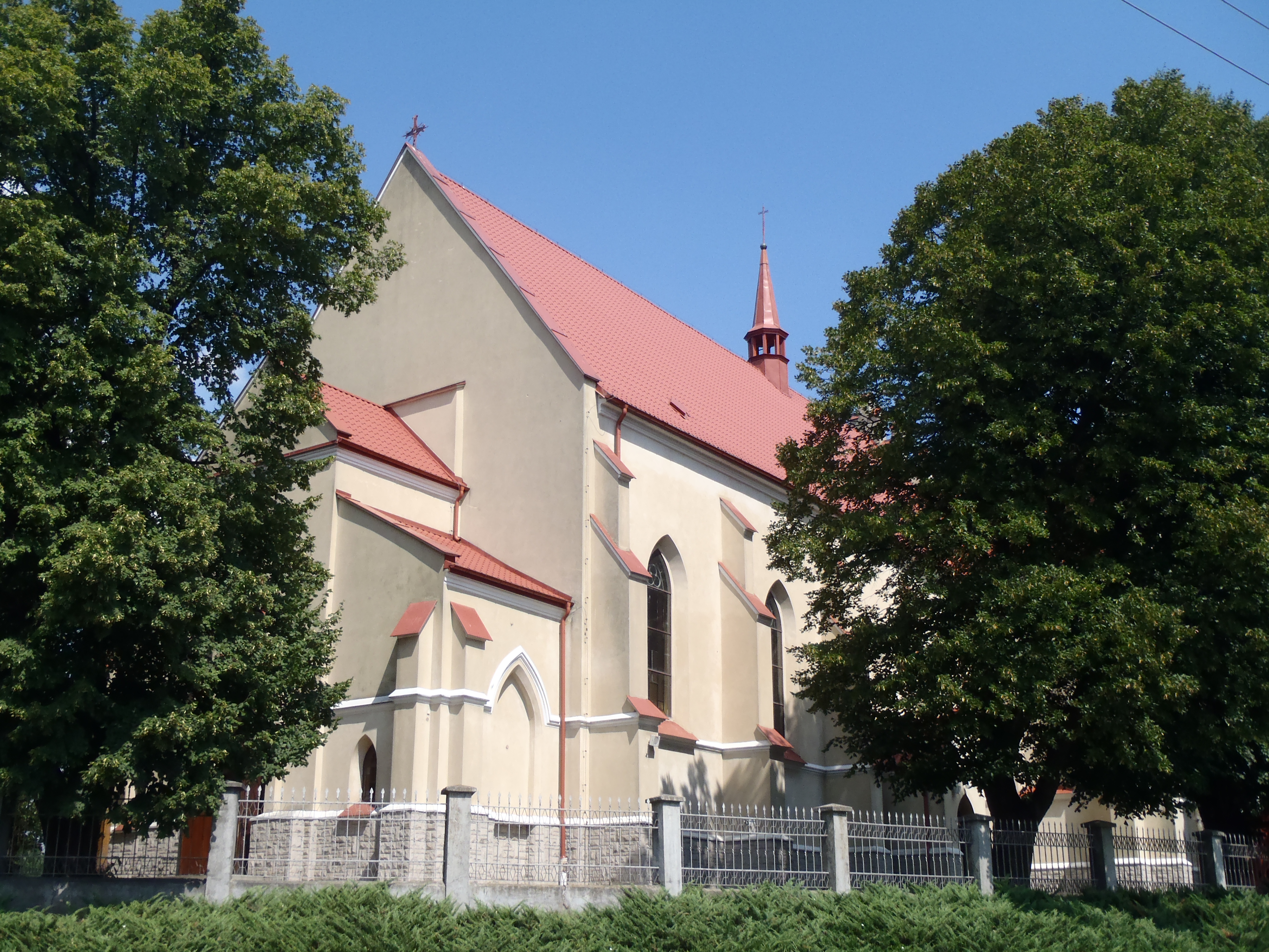 kościół par. p.w. św. Stanisława Biskupa w Zasowie (pow. dębicki)